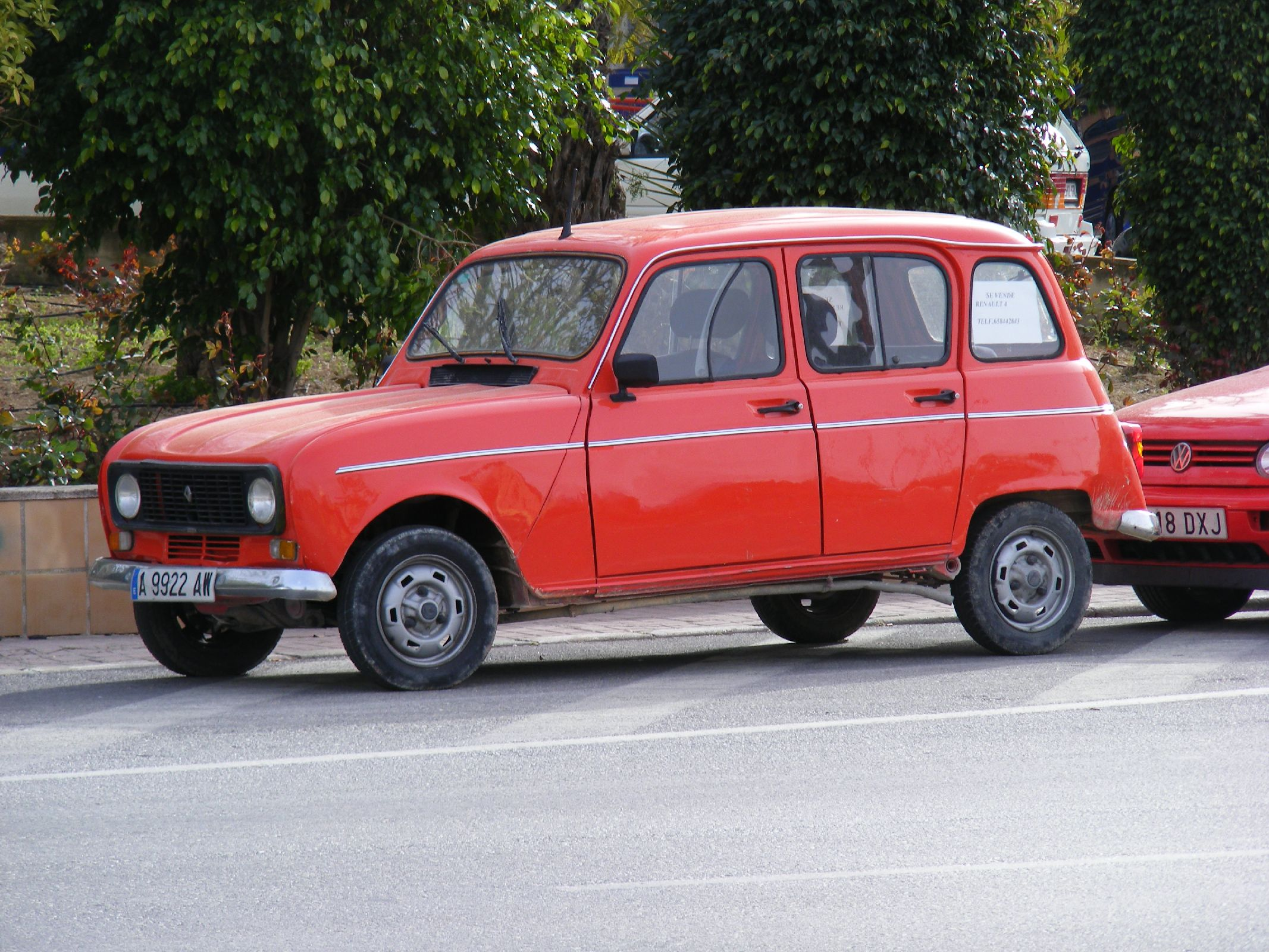 It's for sale Se vende. 1986 Renault 4